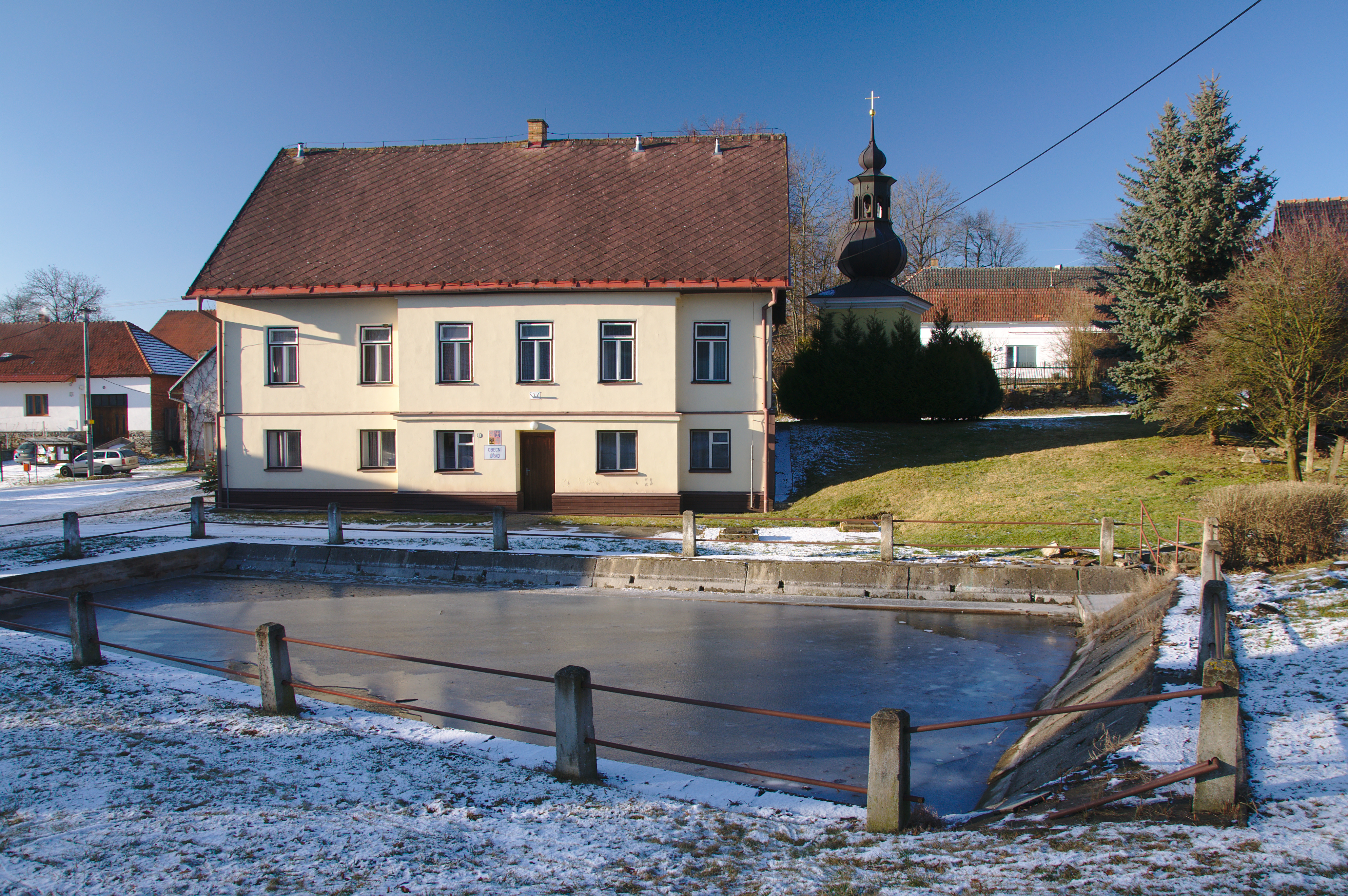 Obecní úřad, Ústup, okres Blansko